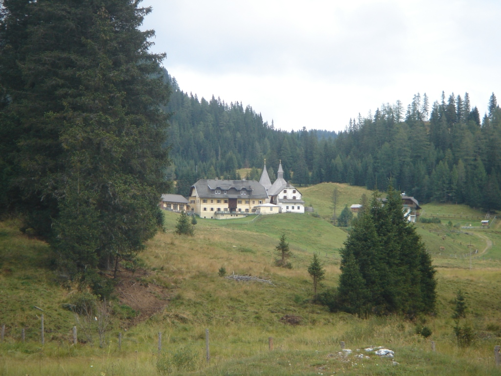 Panoramaaufnahme der Flattnitz.